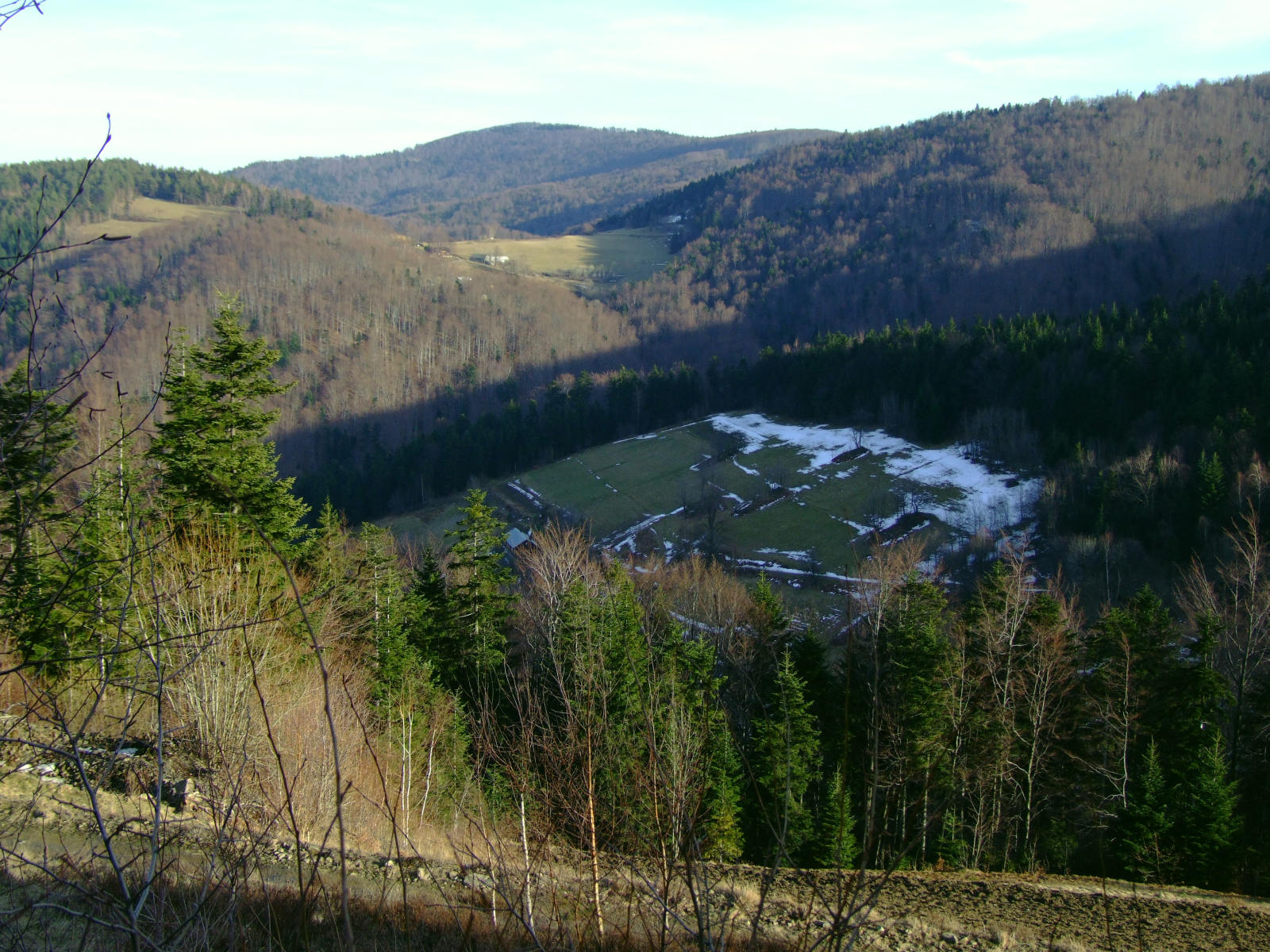 Jaworzna (województow małopolskie). Osiedle w górnej części wsi na pólnocnych zboczach Sałasza